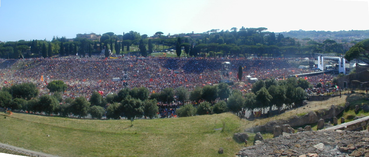 Roma (Italia), 24 giugno 2001. Vista del Circo Massimo dal colle Palatino durante la festa per lo Scudetto 2000-01 dell'A.S. Roma, prima del concerto di Antonello Venditti.